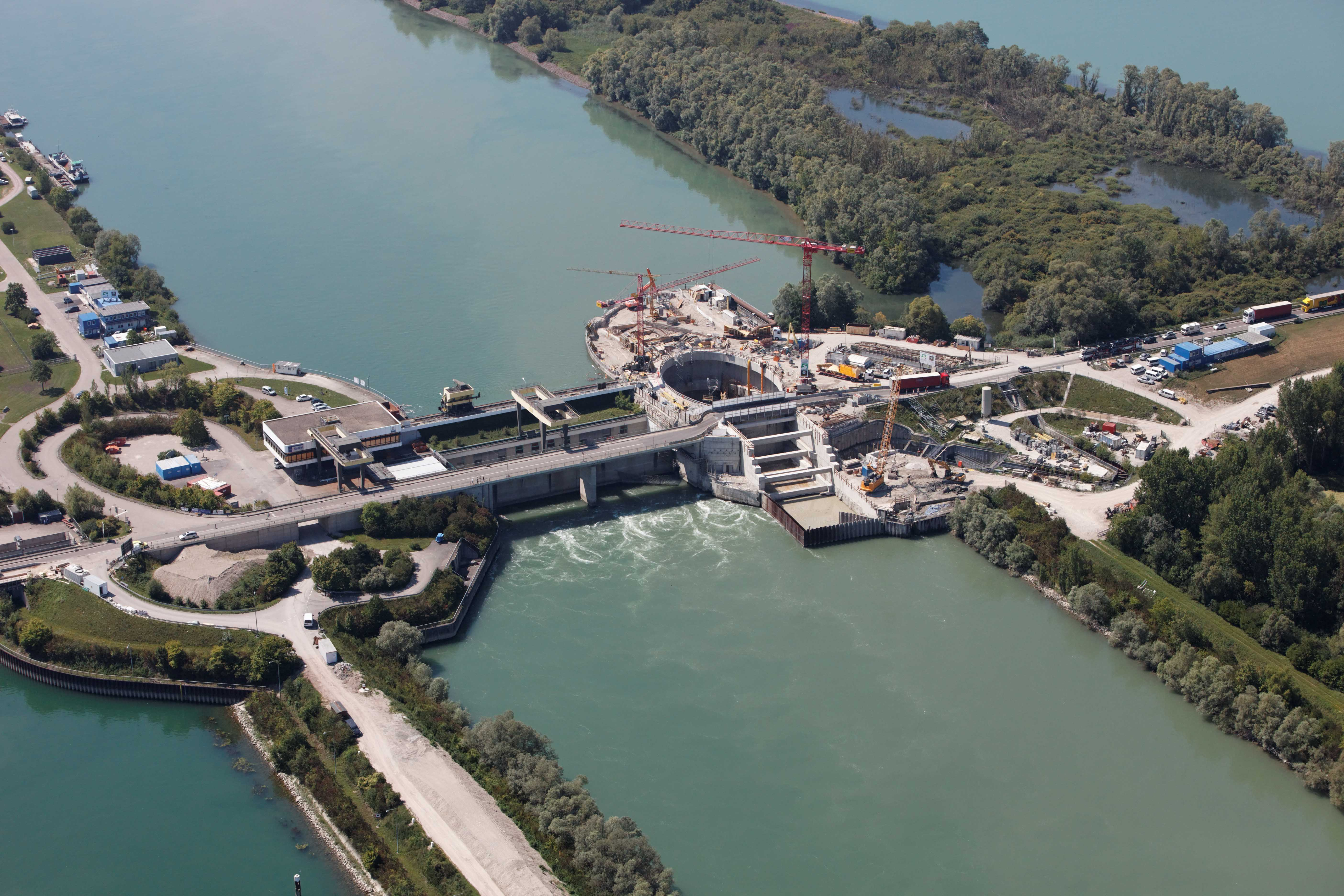 Arbeiten an der Staustufe des neuen Rheinwasserkraftwerks Iffezheim